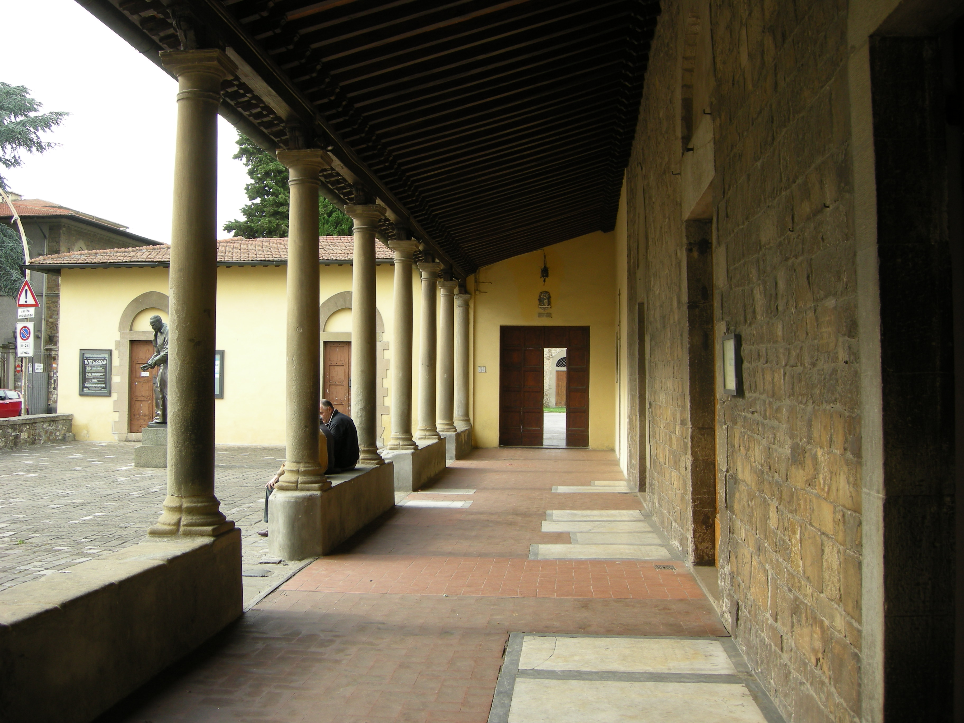 Santo stefano in pane, portico